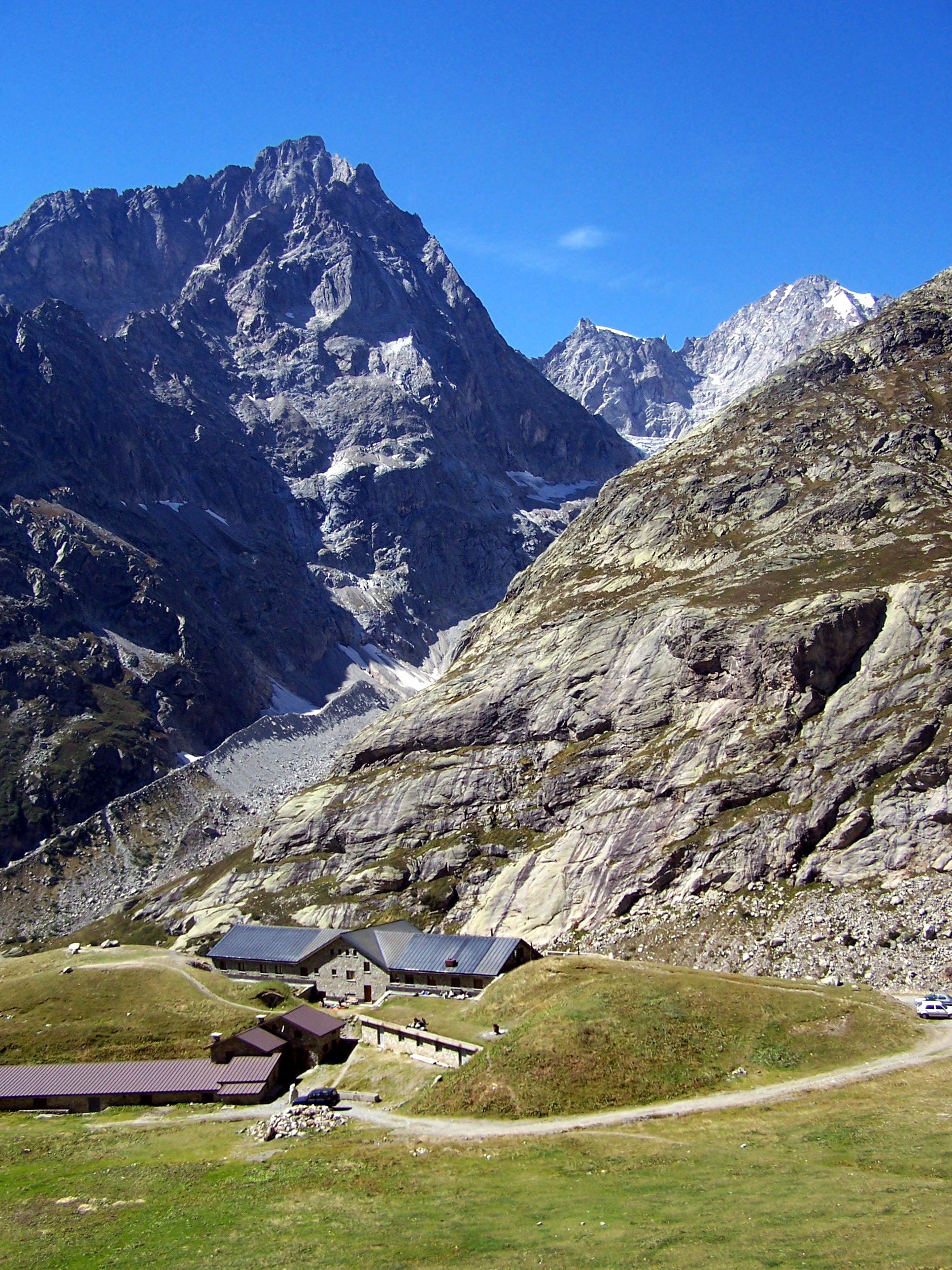 Rifugio Elena, Val Ferret, Italy